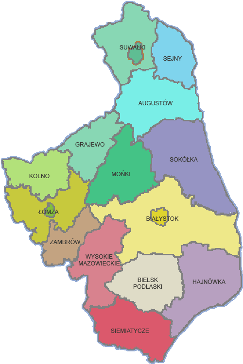 Podział na powiaty w województwie podlaskim